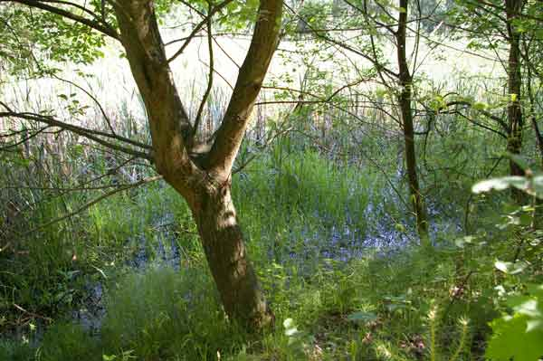 Impression aus dem NSG Further Moor